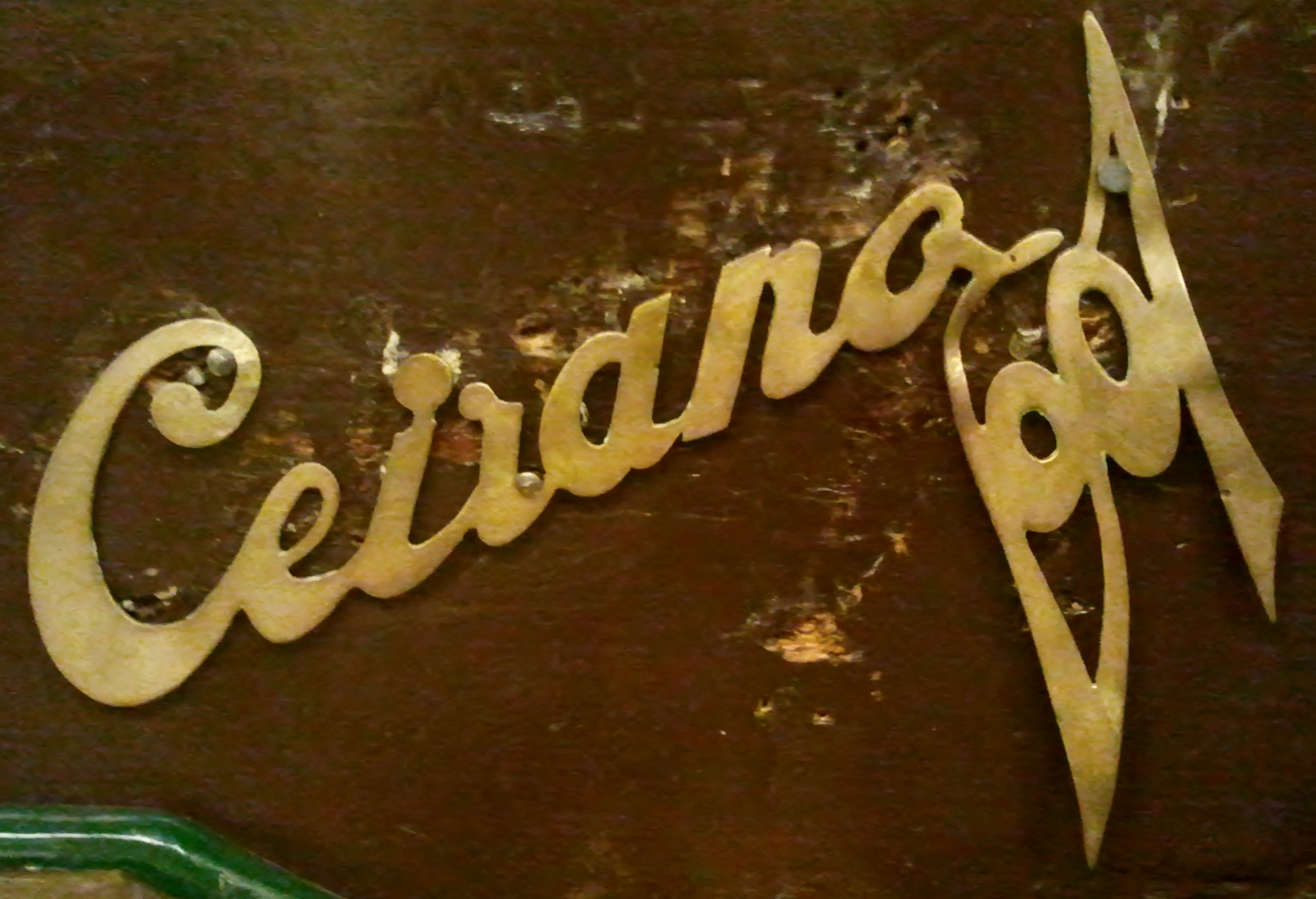 Cerano 1901 logotype